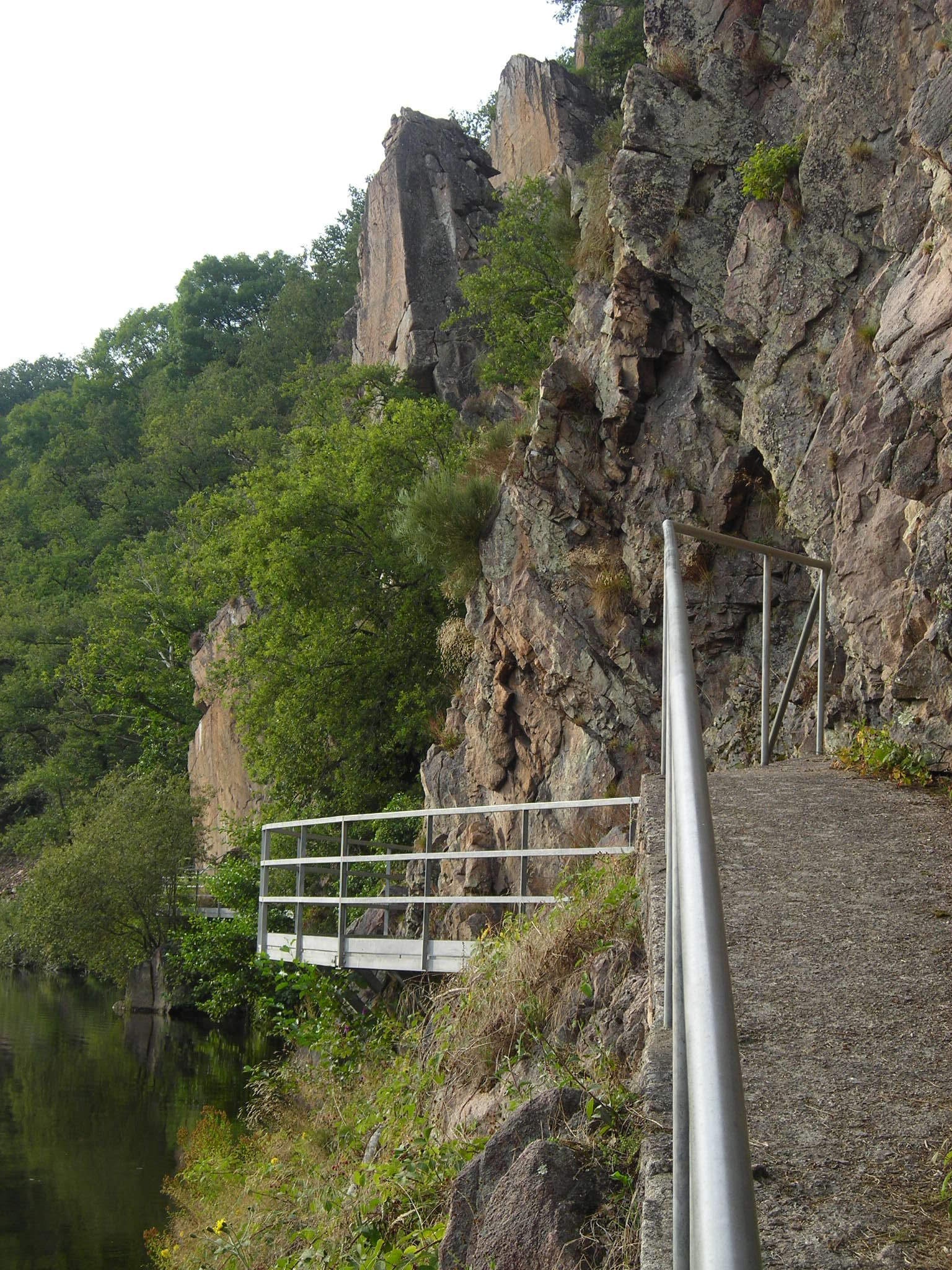 Rochers de Jupille, commune du Bourg-d'Hem en limite de celle d'Anzême, Creuse.